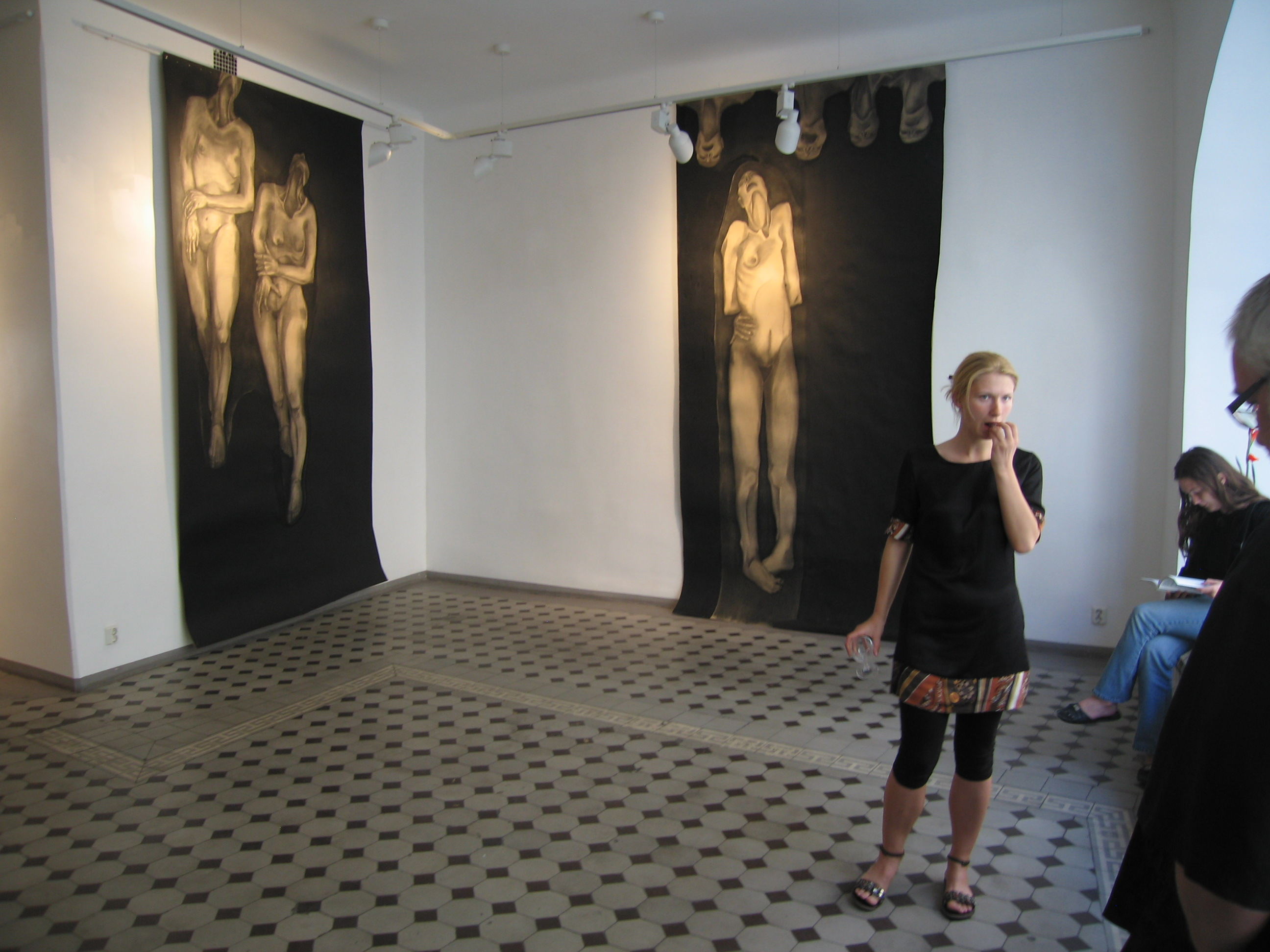 Nadežda Tšernobai oma esimese isikunäituse "Süütuse kollane suudlus" avamisel Draakoni galeriis.Foto: Robert Treufeldt, 9. juuni 2006